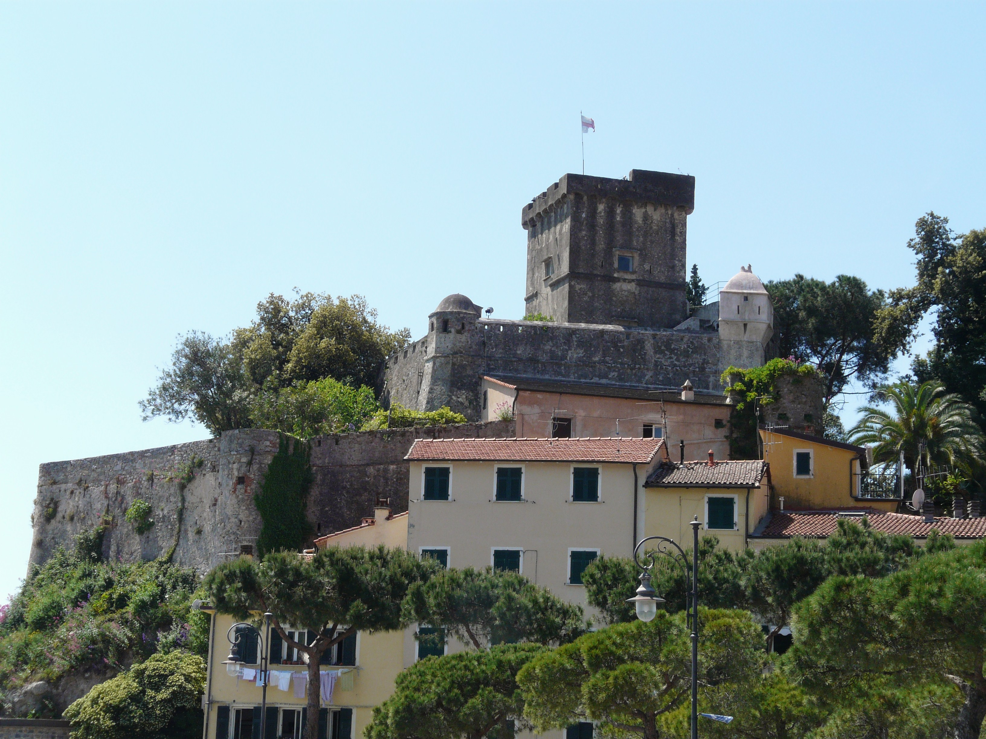 Castello di San Terenzo, San Terenzo, Lerici, Liguria, Italia